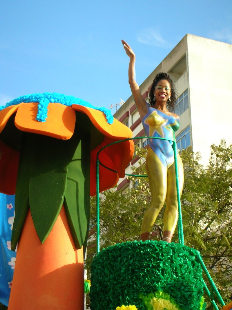 Carnaval de Loulé Valter Jacinto